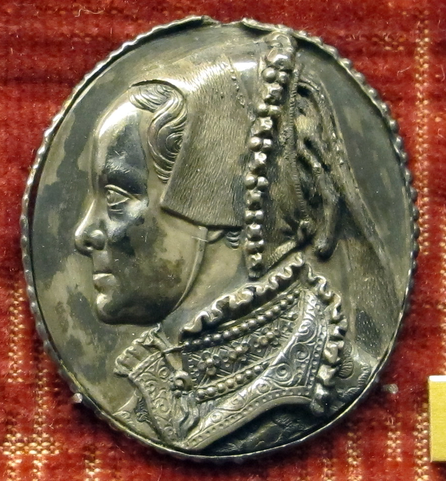 Medaglia ovale di Maria I Tudor